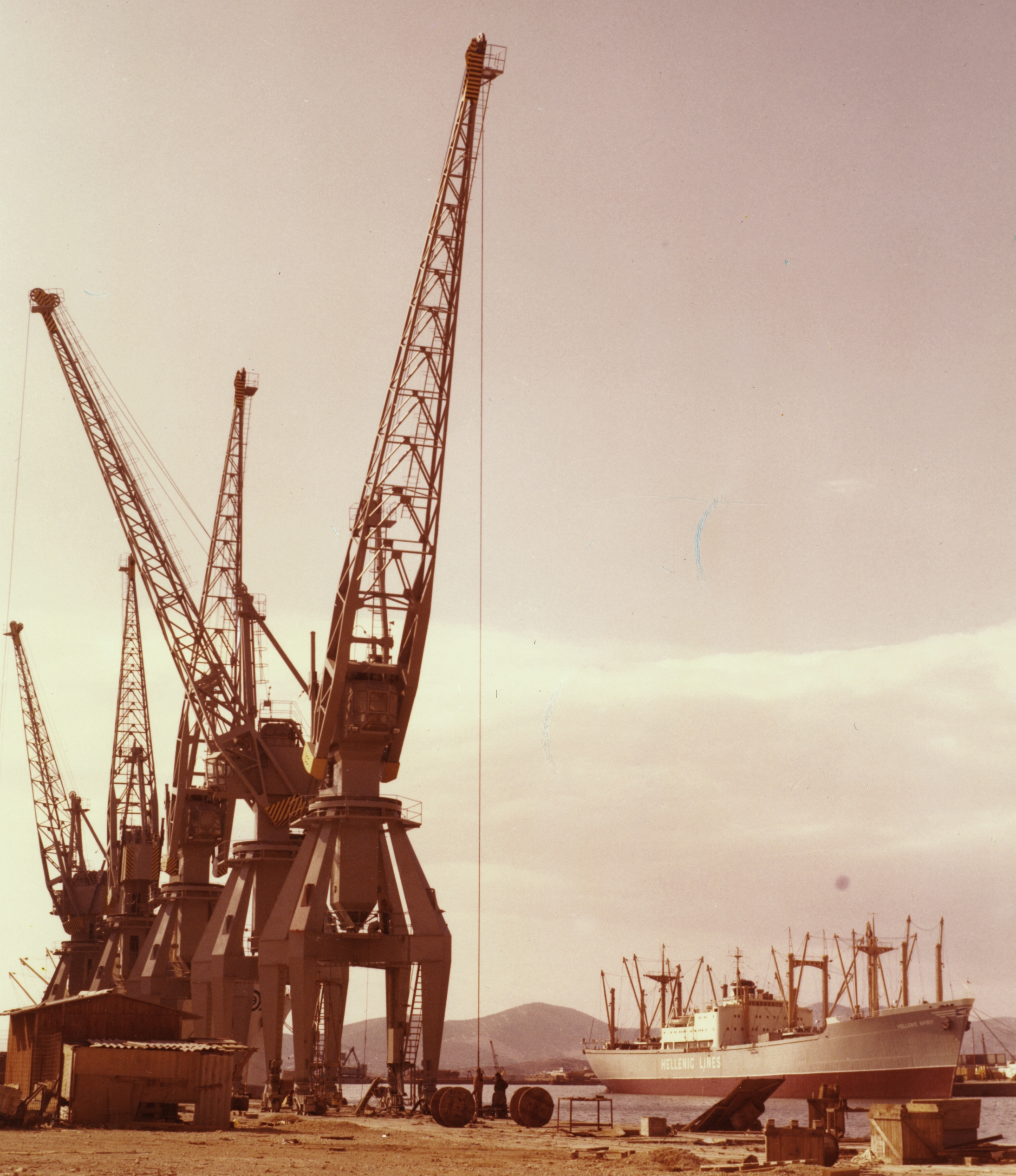 kikötő, 6 tonnás Ganz (vélhetően Magyar Hajó- és Darugyár) portáldaruk.